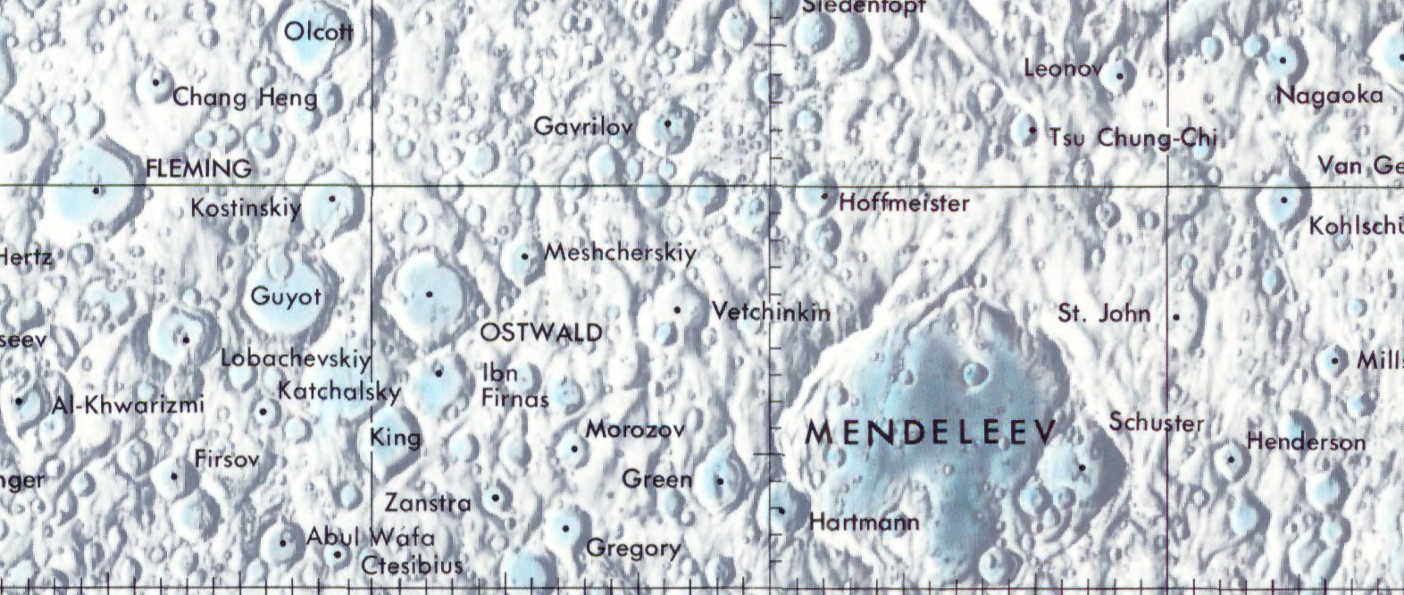 Cráter lunar Vetchinkin. Localización. (Lunar Chart LPC1. Second Edition)